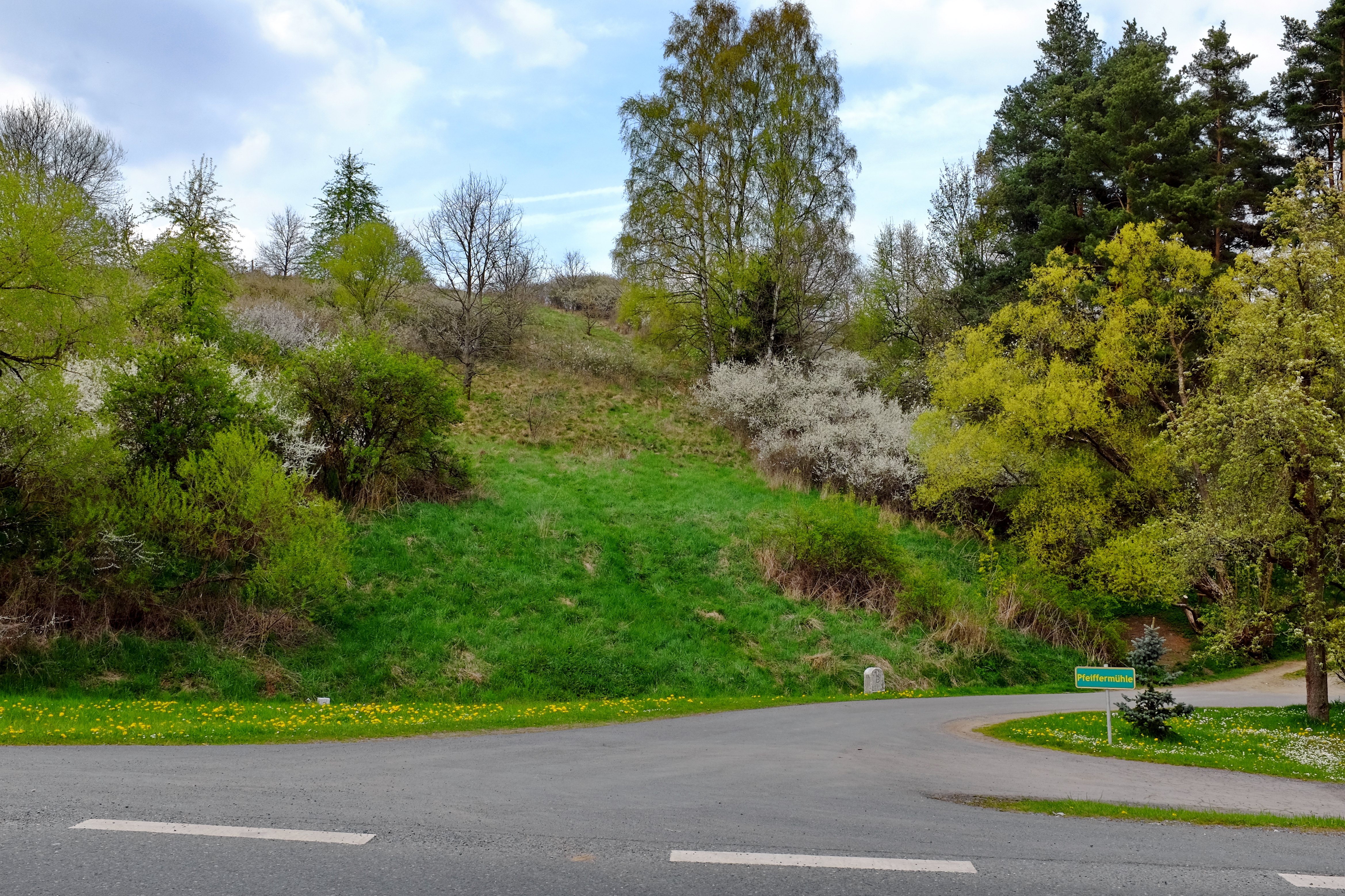 Přírodní rezervace Stráň u Dubiny, Smrčiny, okres Cheb